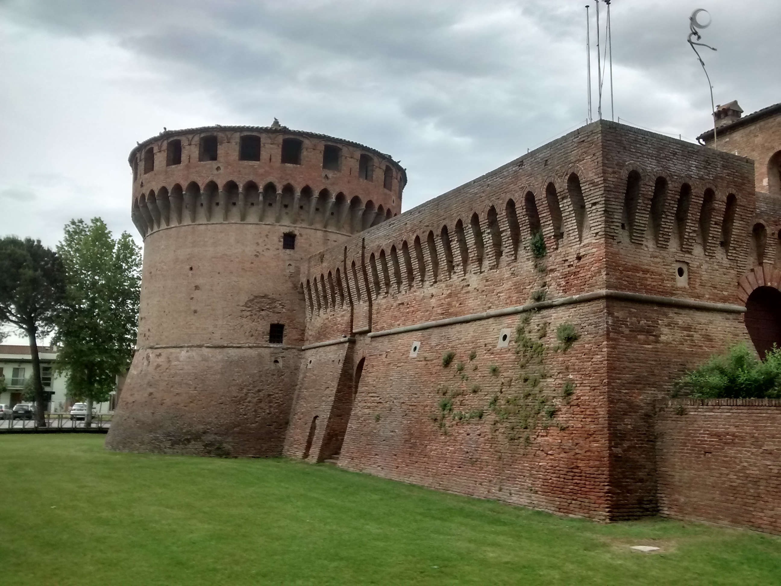 Castello Sforzesco (Bagnara di Romagna)